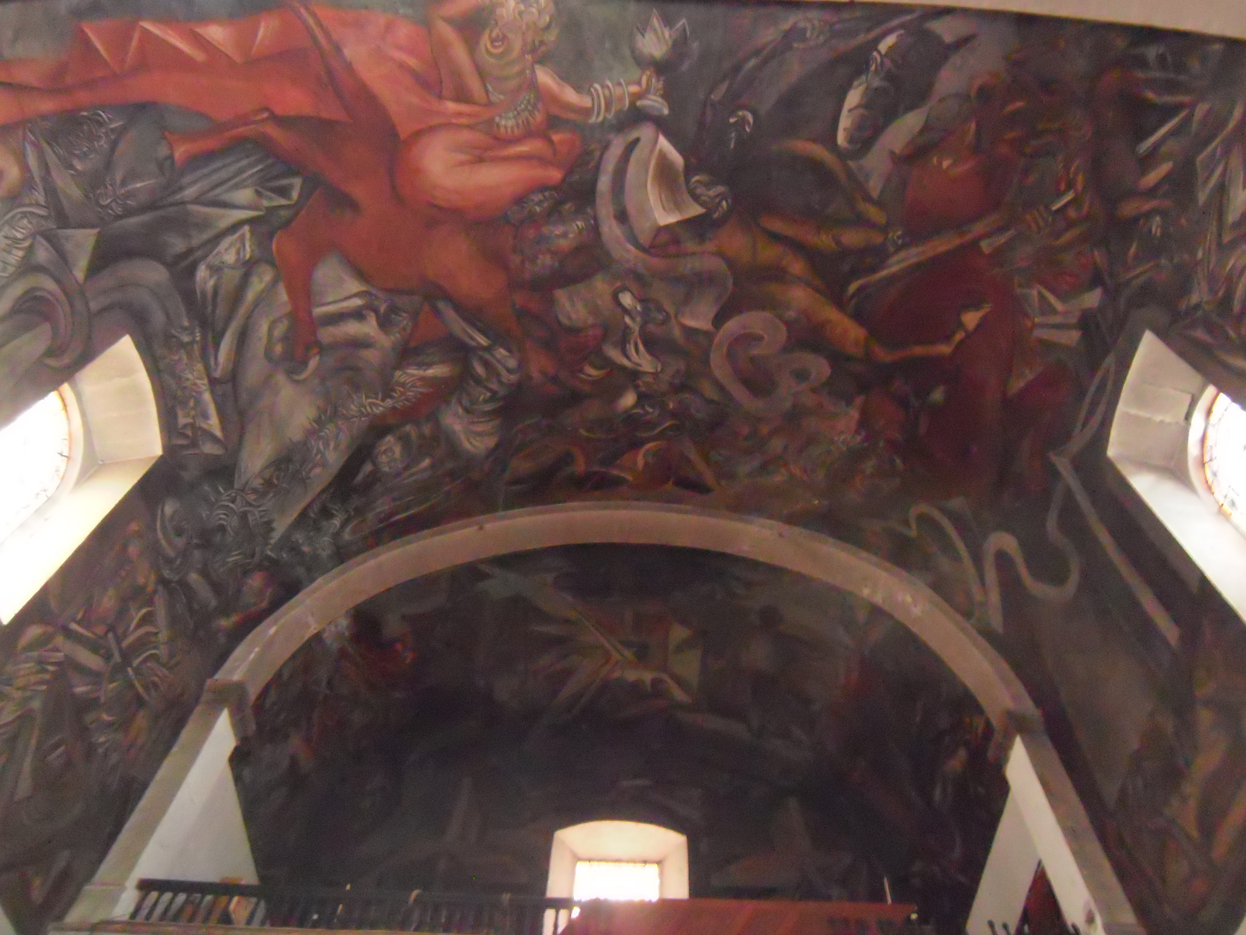 El Mural del Apocalipsis de José Clemente Orozco en el Templo de Jesús Nazareno (Cuauhtémoc)